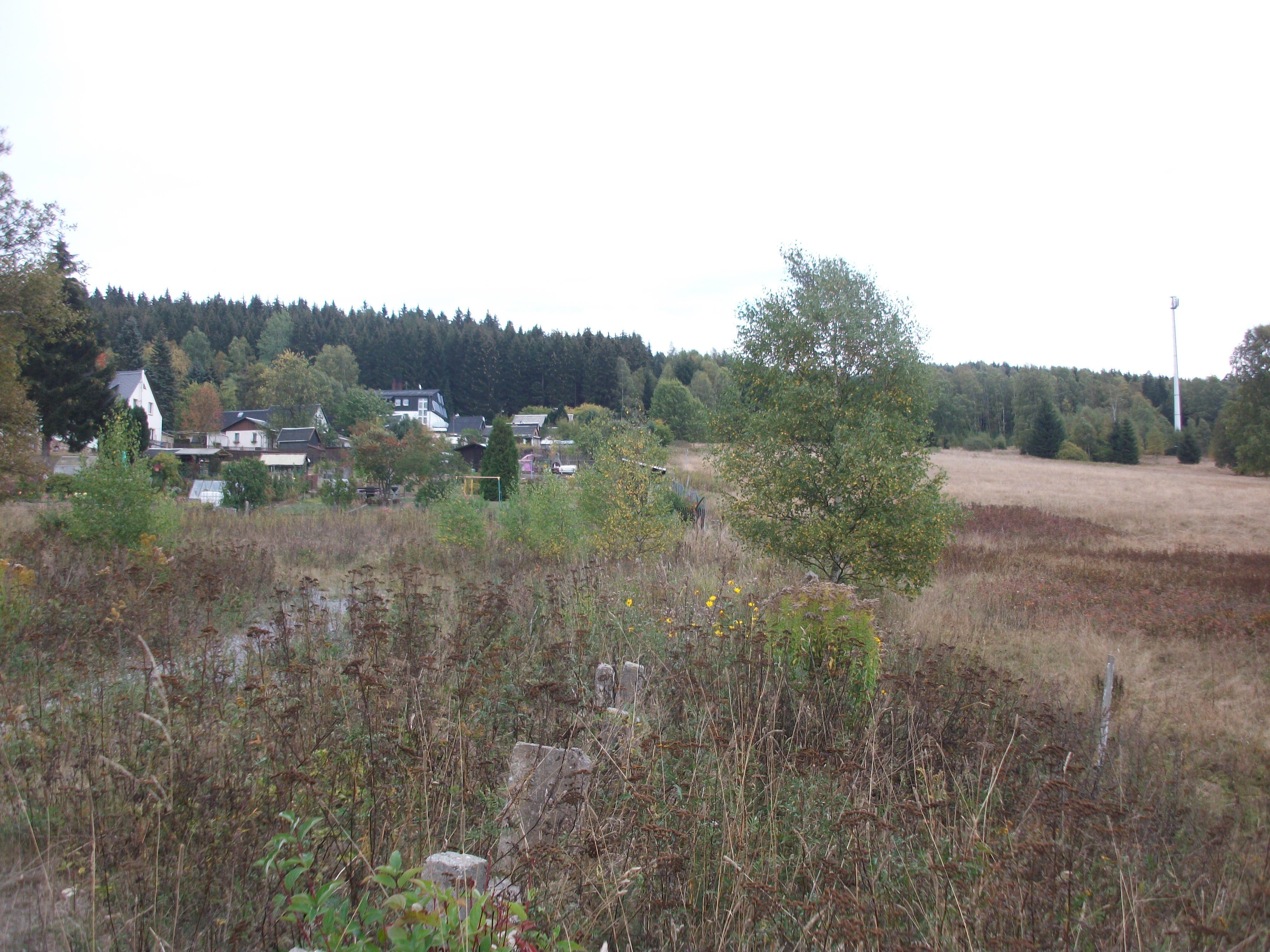 Pachthaus (links) an der tschechischen Grenze